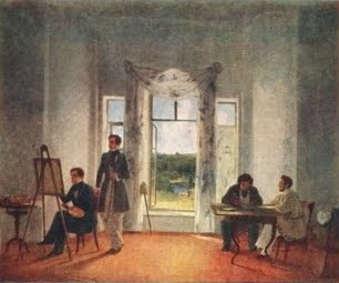 «В Качановке, имении Тарновского». В Штернберг. На обороте картины есть надпись «Картина художника Штернберга. Писана в 1838 году в имении Г.С. Тарновского Качановке Черниговской губ. Комната эта была рабочим кабинетом М.И. Глинки – за партитурой «Руслан и Людмила» и историк Малороссии Н.А. Маркевич, занятый сохранением текста баллады Финна. За мольбертом сам художник, а сзади его владелец Качановки. Здесь в 1835 году была первая проба оркестровых и хоровых партий Руслана. Сходство лиц и в особенности фигур замечательное. Очевидец, кому тогда было семь лет, сын историка А. Маркевич. Возможно, что именно эта картина указана с ошибкой в названии в энциклопедическом словаре Брокгауза и Ефрона как «М. И. Глинка в имении Г. С. Перовского за сочинением оперы «Руслан и Людмила»